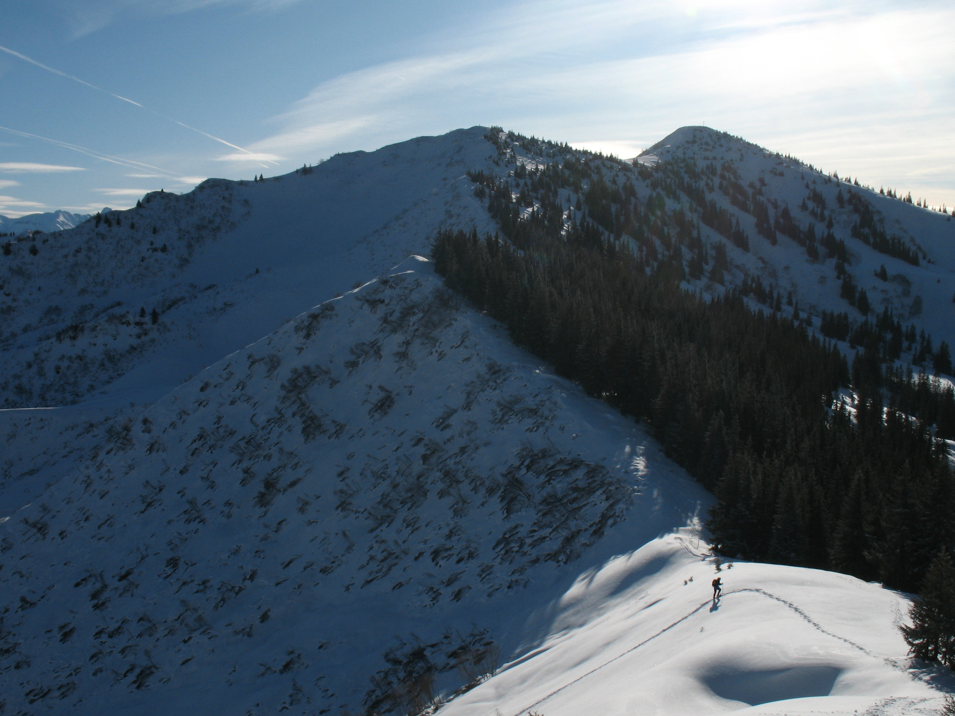 Blick vom Dreifahnenkopf (1628 m) über den Nordgrat auf das Riedbergerhorn (1787 m).